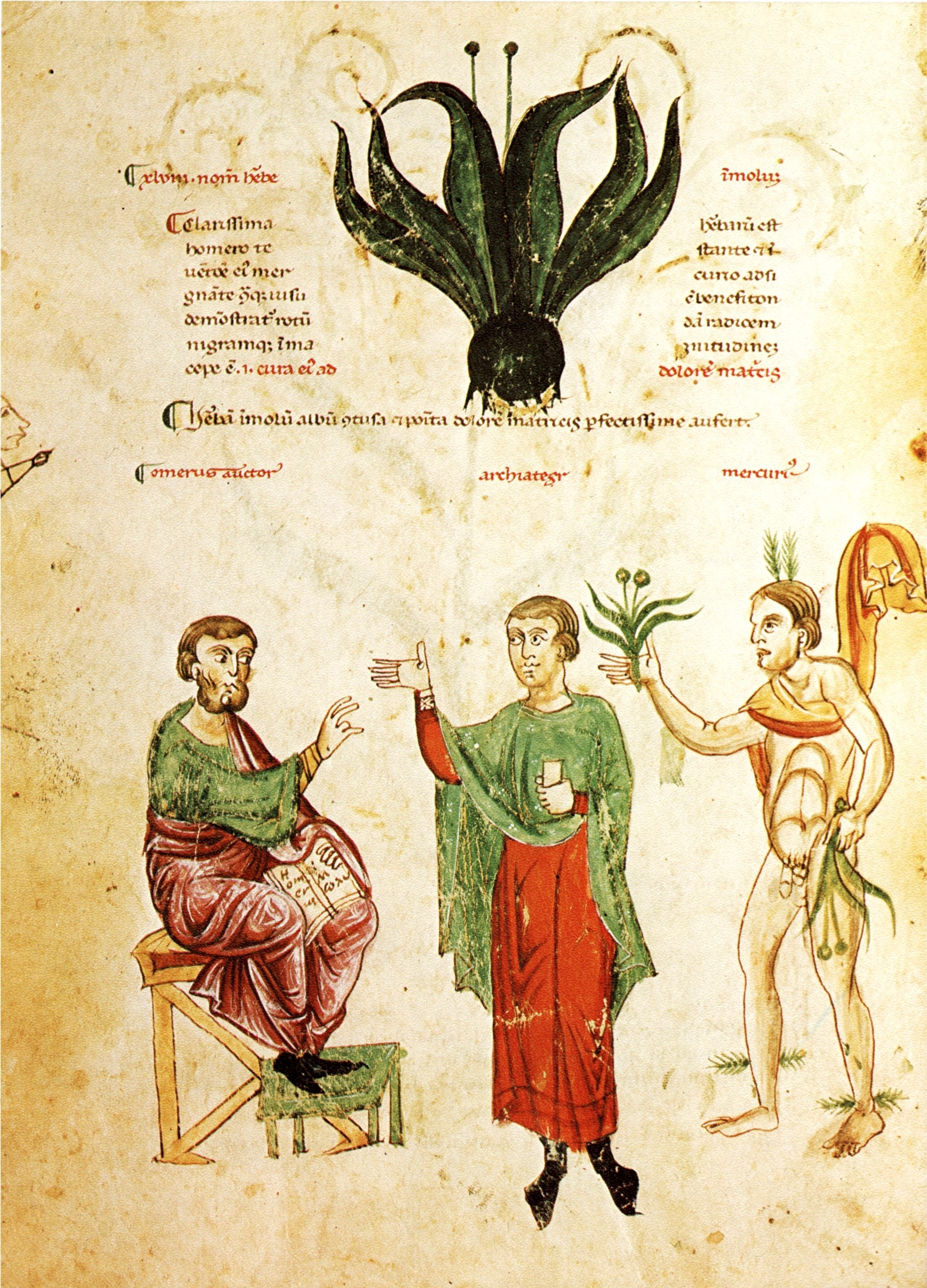 Seite aus dem Kodex Medicina Antiqua (fol. 61 verso). Oben dargestellt ist das Kraut „immolum“, auch bekannt aus Homers Odyssee als „Moly“ (Odyssee 10, 302-306). Nach dem Text ein Mittel gegen Gebärmutterschmerzen, eine zweifelsfreie Identifizierung ist zwar nicht möglich, aber es ist eventuell eine Alliumart). Die allegorische Szene darunter zeigt, von links nach rechts: Homer, (Homerus im aufgeschlagenen Buch) einen Arzt (archiater) und den Gott Mercurius (griech. Hermes), der das Kraut in beiden Händen hält. Die Flügel an Kopf und Fußknöcheln wurden in mittelalterlicher Umdeutung zu grätenartigen Auswüchsen und der eigenartig hochgehobene Mantel könnte auf Wagenlenker in voller Fahrt zurückgehen. Weiters bemerkenswert sind die hier ausnahmsweise nicht getilgten Genitalien.